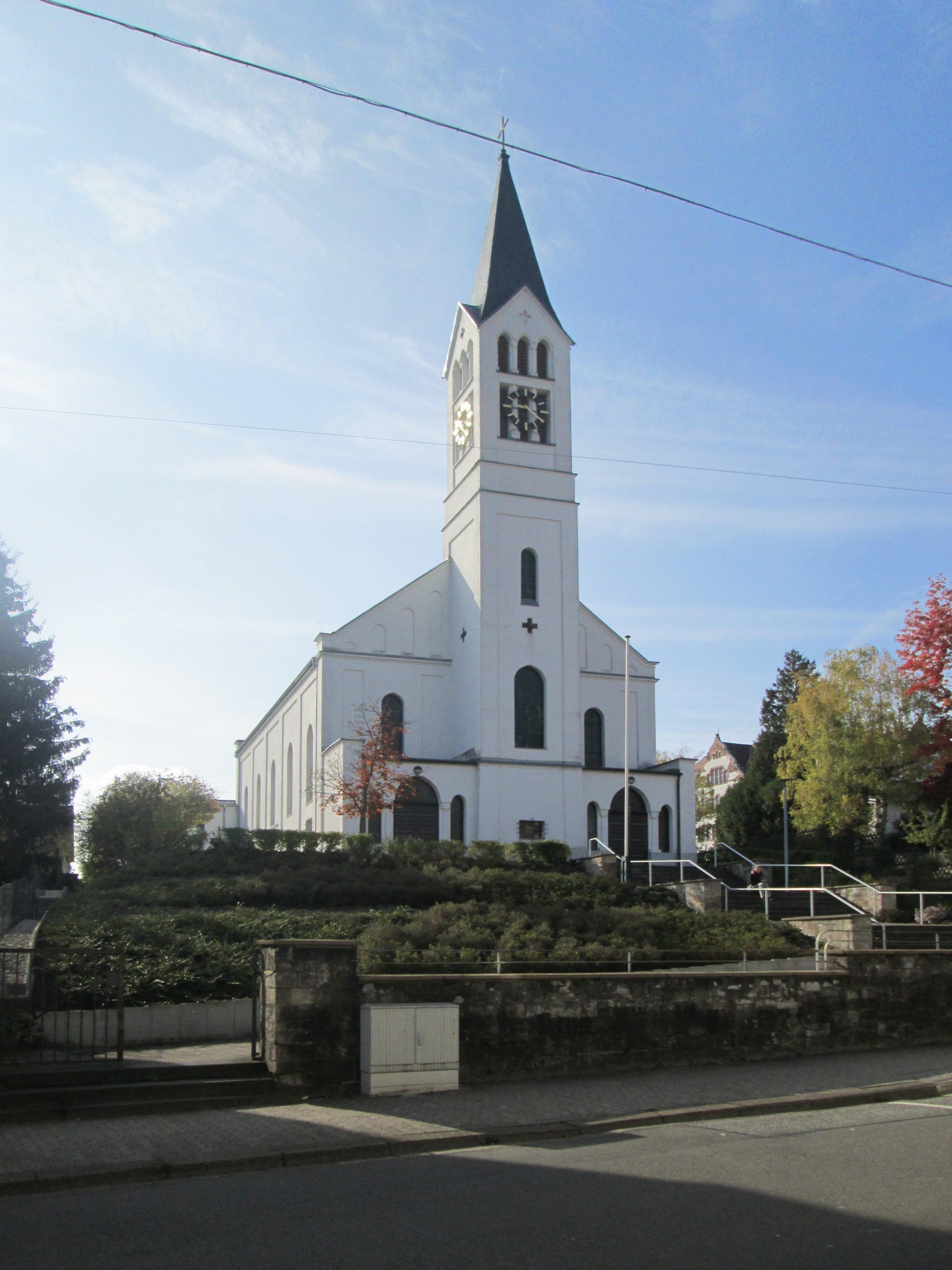 Martin-Luther-Kirche in St. Ingbert, erbaut 1859 im neugotischen Stil mit neoromanischen Elementen